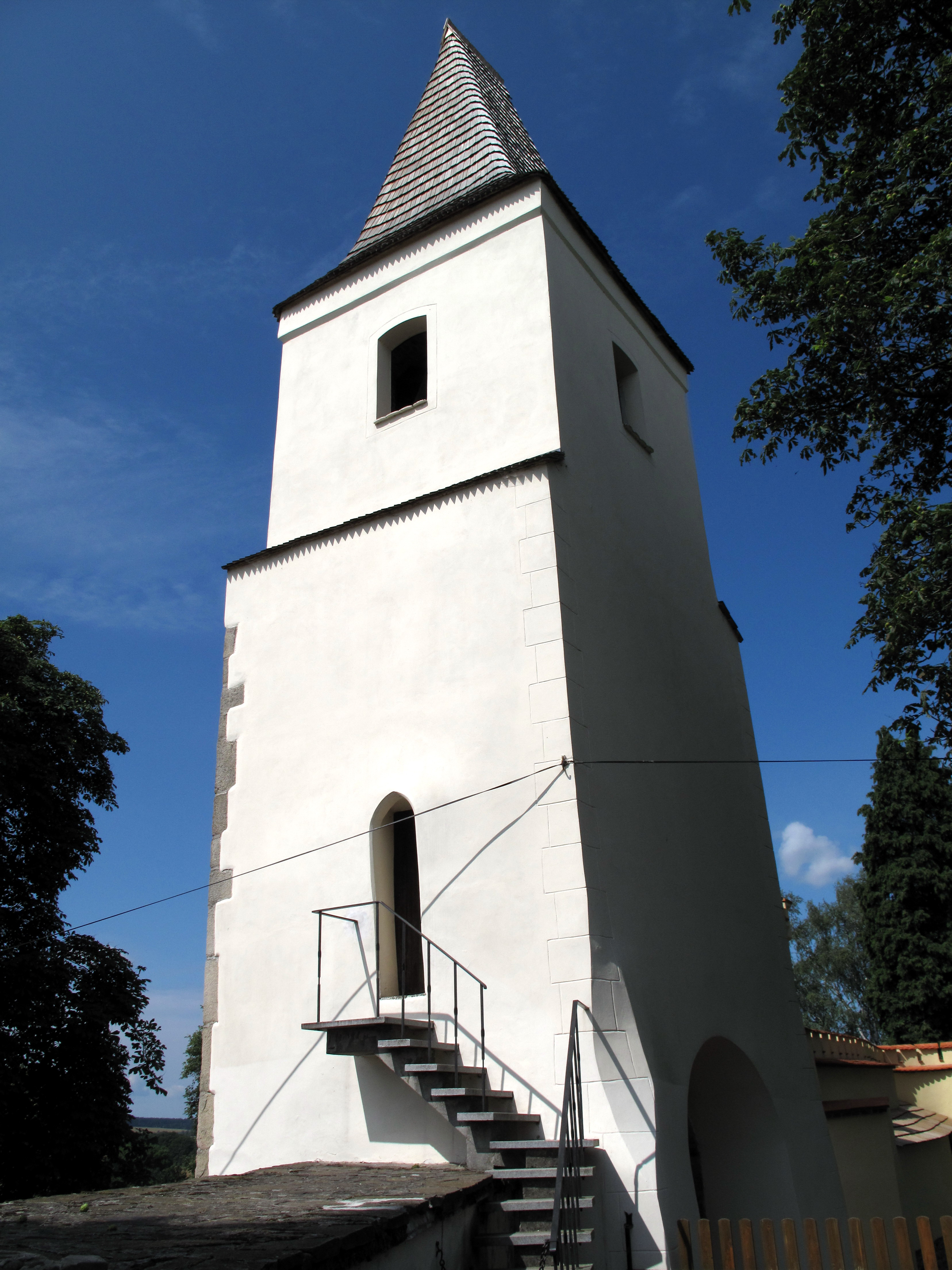 Hrad Kámen